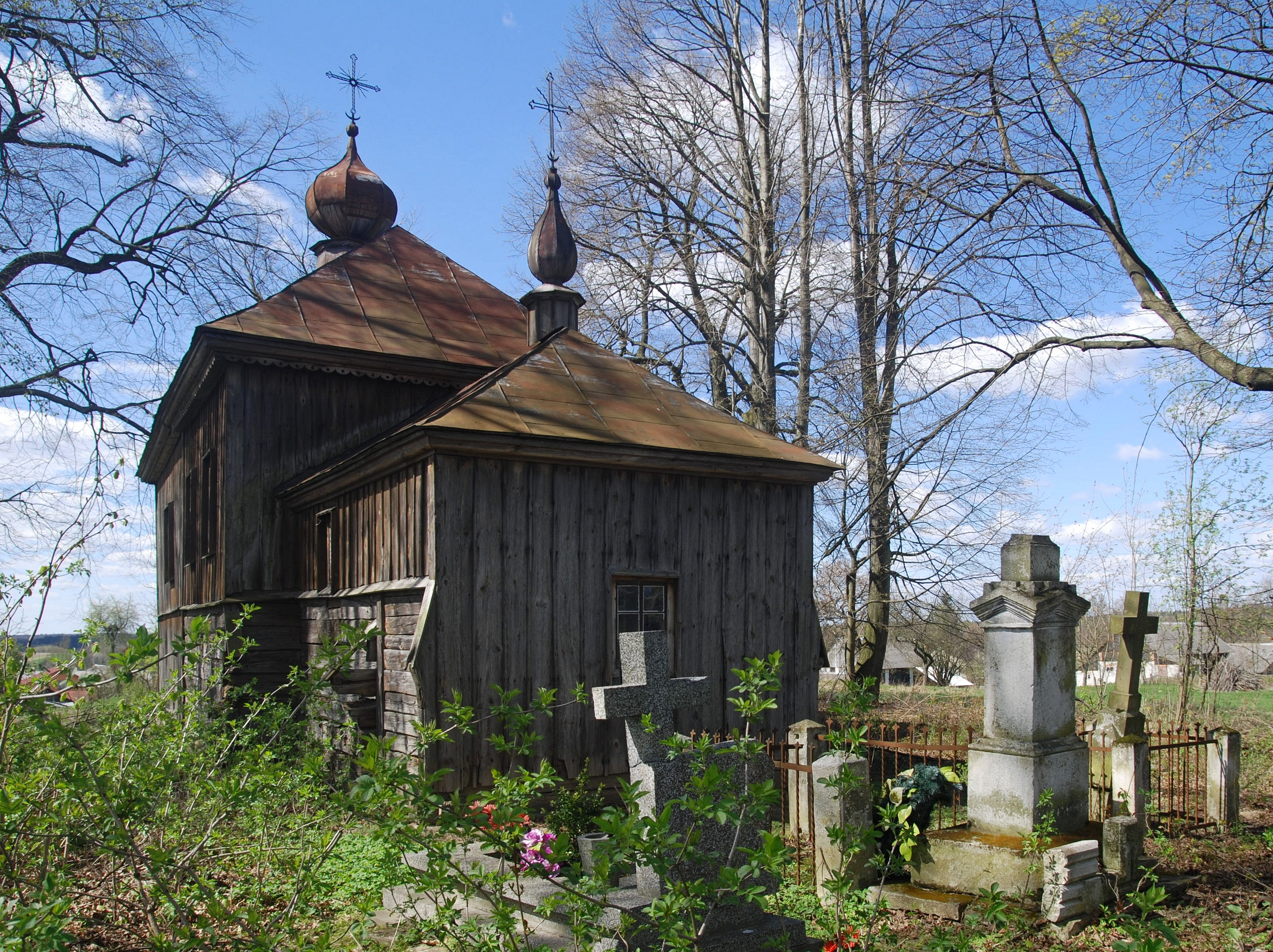 wieś Żmijowiska, cerkiew Zaśnięcia Matki Bożej Wikidata has entry Q9187226 with data related to this item.